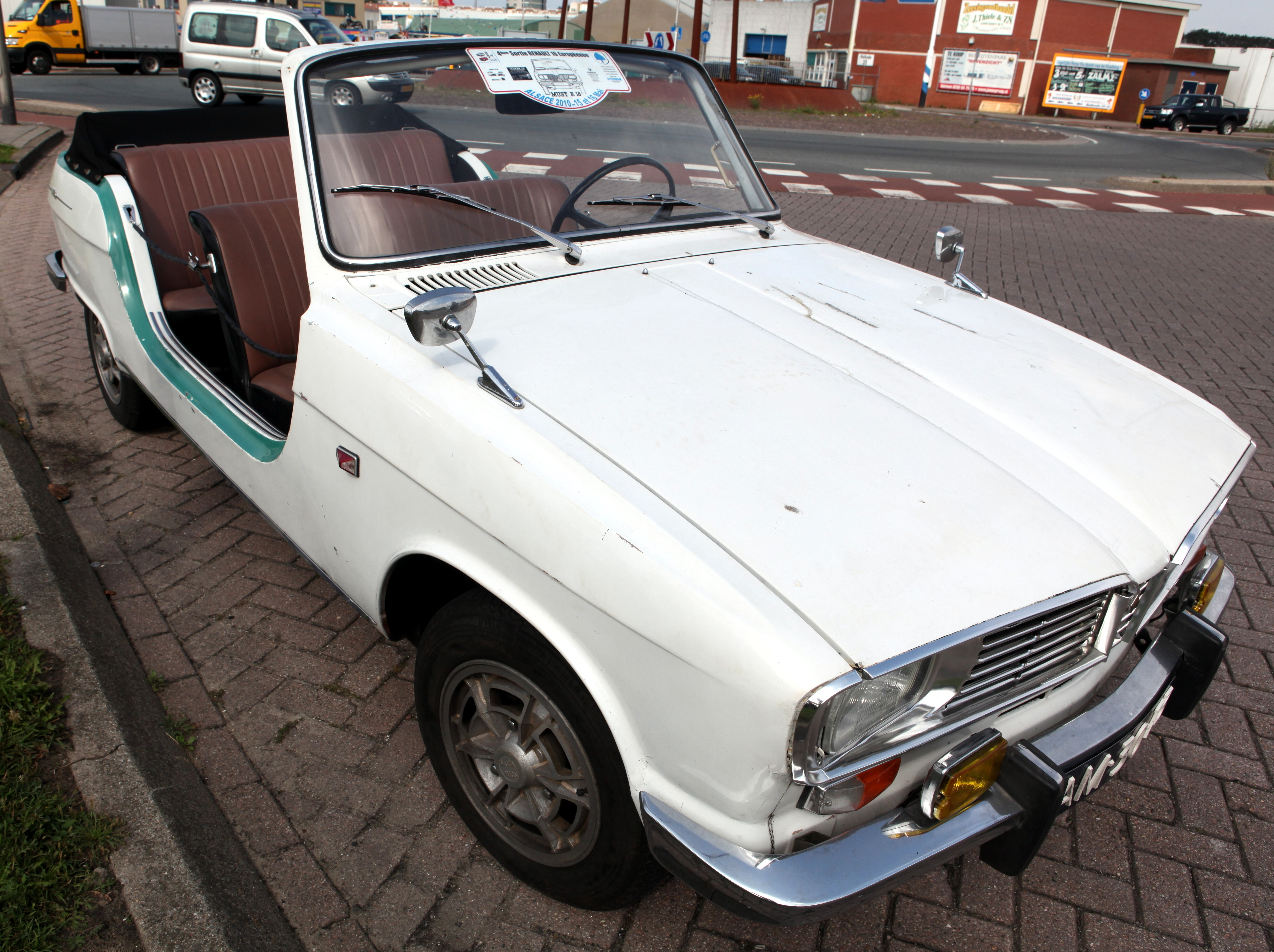 Renault R 16 convertible